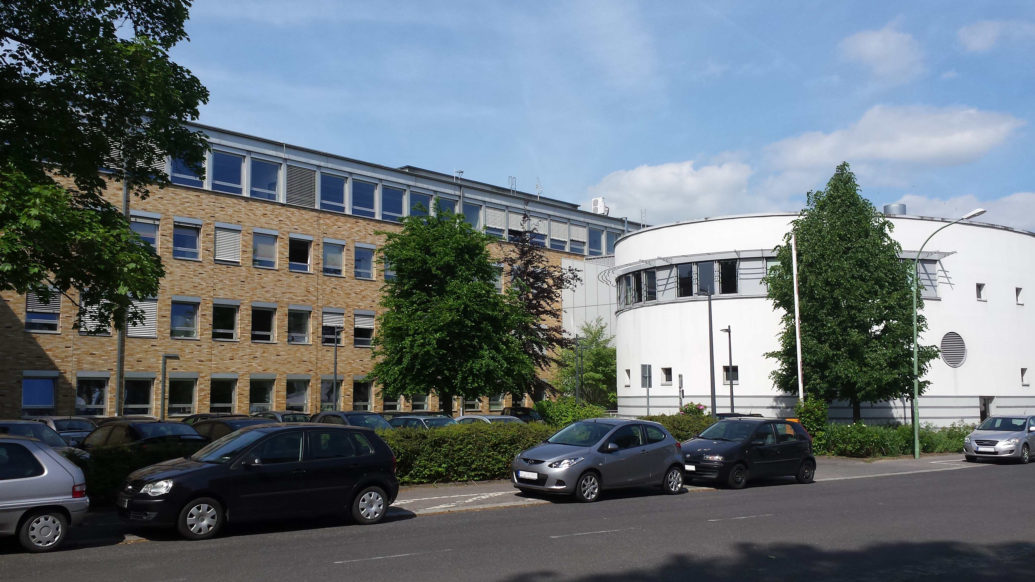 Hauptgebäude der Technischen Hochschule Mittelhessen (THM), Campus Friedberg